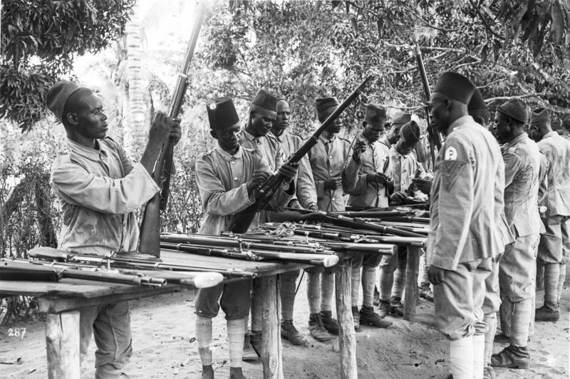 Polizeiaskaris beim Gewehrreinigen